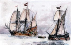 Jens Munks skibe under porlarekspedition